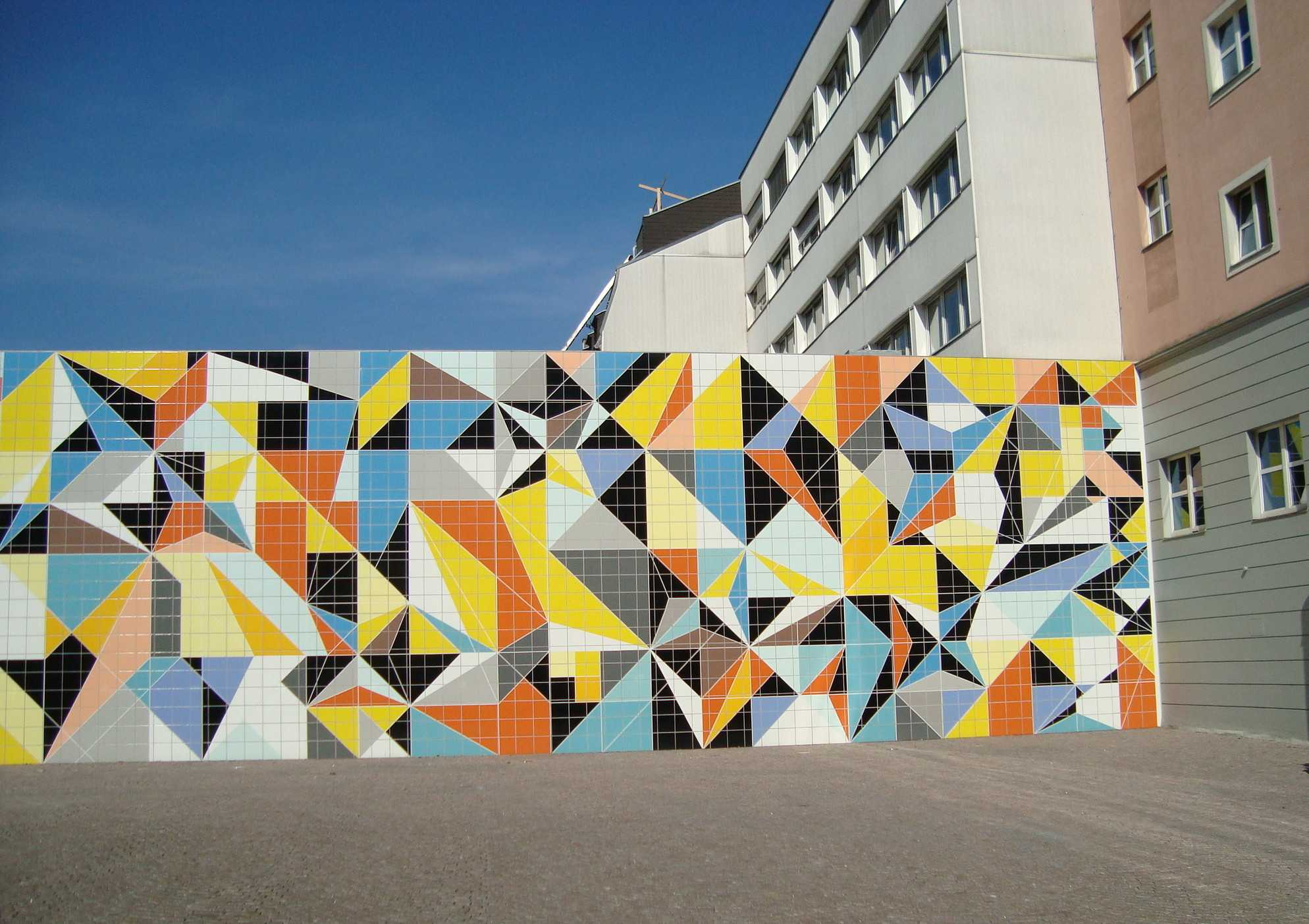 Sarah Morris, Hornet (Origami); Düsseldorf, K 20, Paul-Klee-Platz